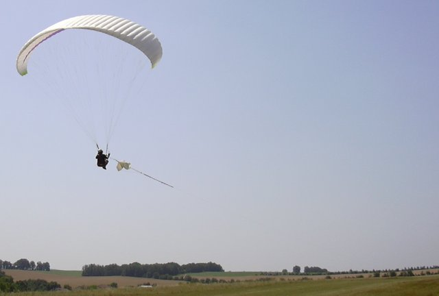 Treuillage d'un parapente à St Clar de Quercy. Auteur Xavier Bonnafous (Xulin)